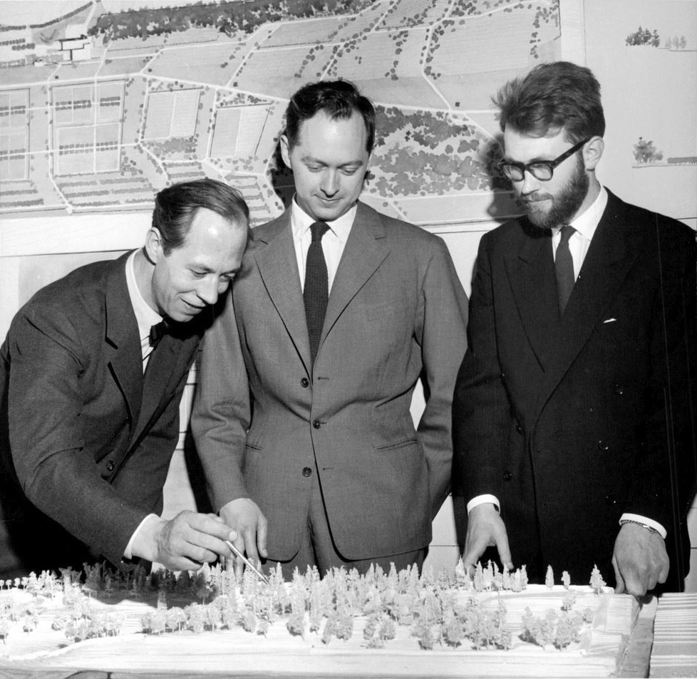 Konstakademien firade på fredagen sin årliga högtidsdag i närvaro av konungen. Akademiens preses arkitekt Hakon Alberg inledningstalade. Arkitekt Per Friberg fick kunglig medalj för sin utformning av en kyrkogård. Till höger om honom står Stig Forsberg och Stig Jacobson som både fick sina hertigliga medaljer.